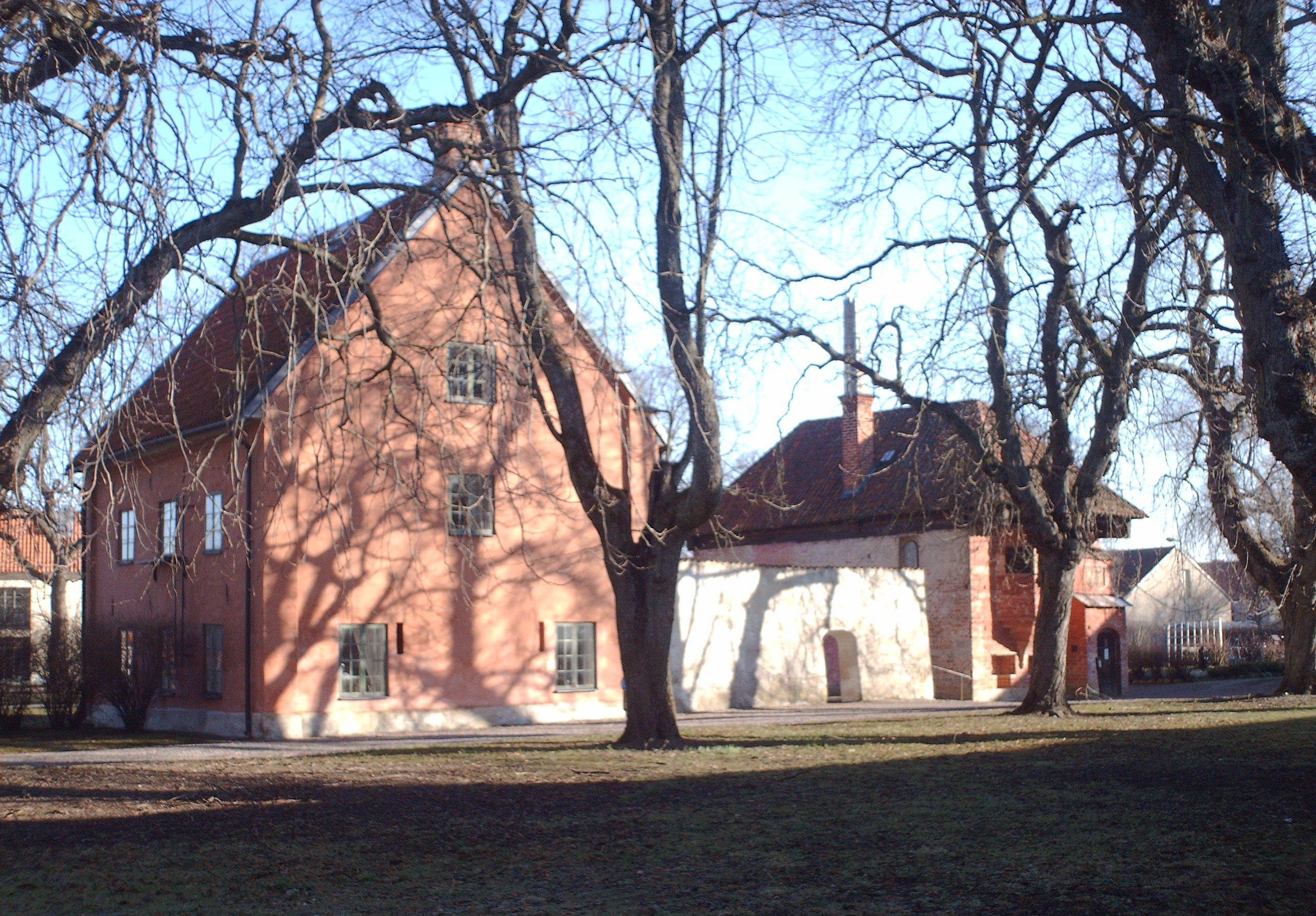 Vadstena jospital, Sweden